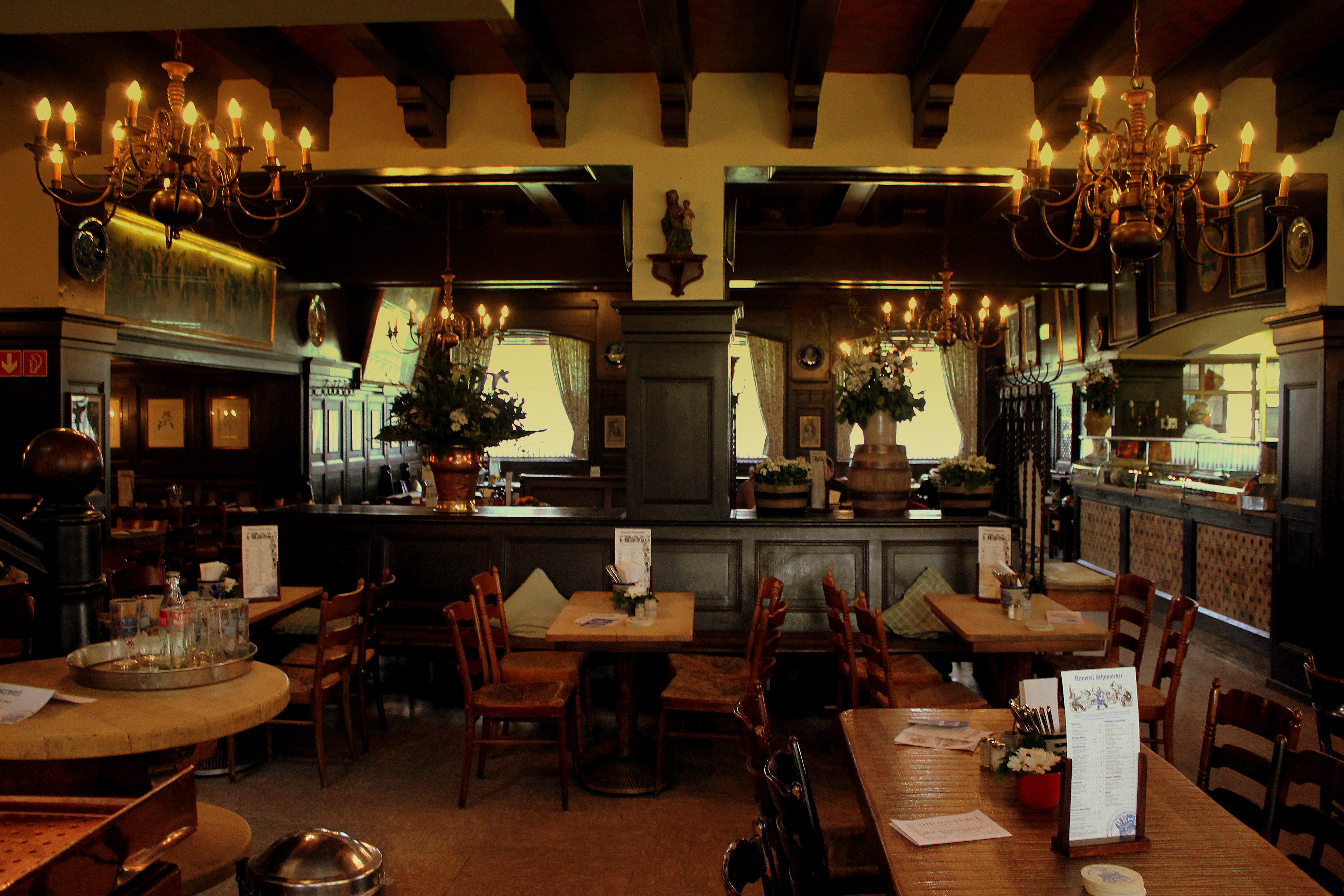 BIERBRAUEREI FERN SCHUMACHER OST STRASSE DUSSELDORF GERMANY APRIL 2013